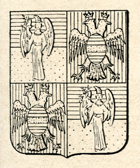 Blason de la famille Persico, issue de Vittorio Spreti, Enciclopedia storico-nobiliare italiana, Milan, 1928-32, vol. V, p. 273